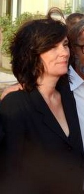 Catherine Corsini au festival du film de Cabourg